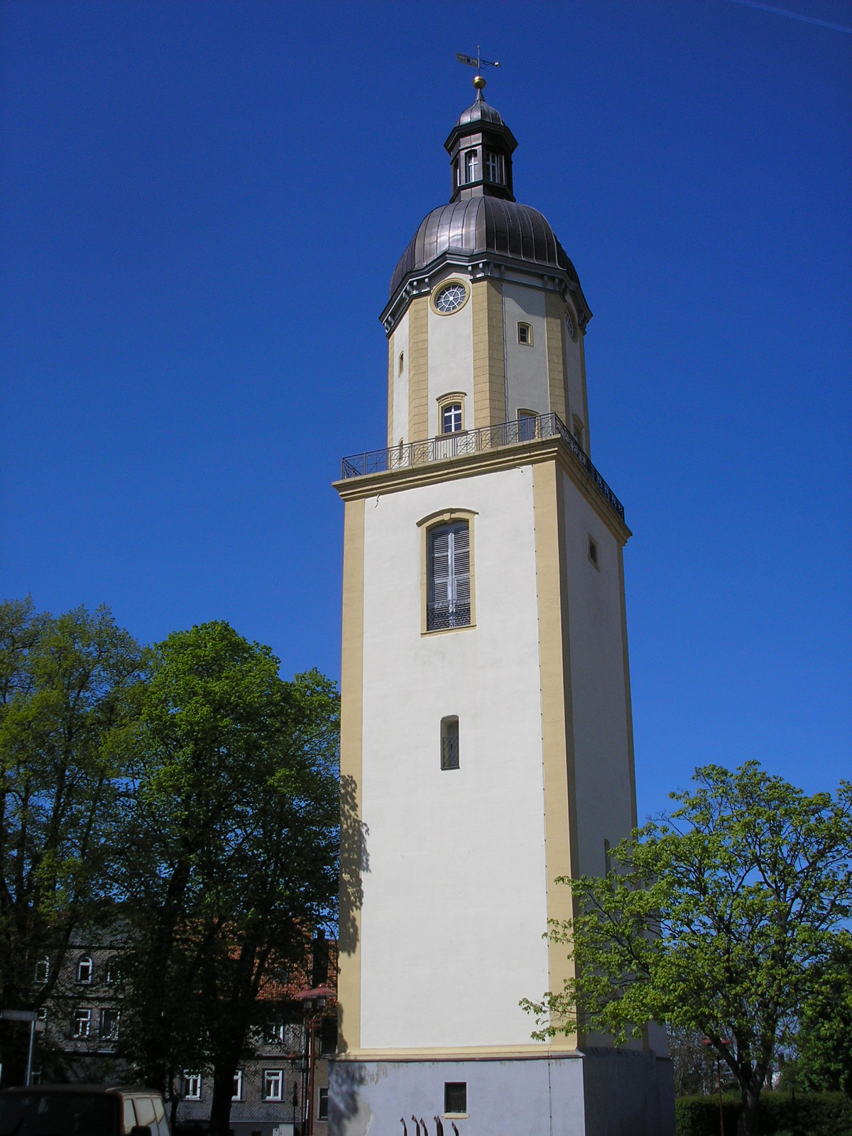 Der Michaeliskirchturm in Ohrdruf (Thüringen).